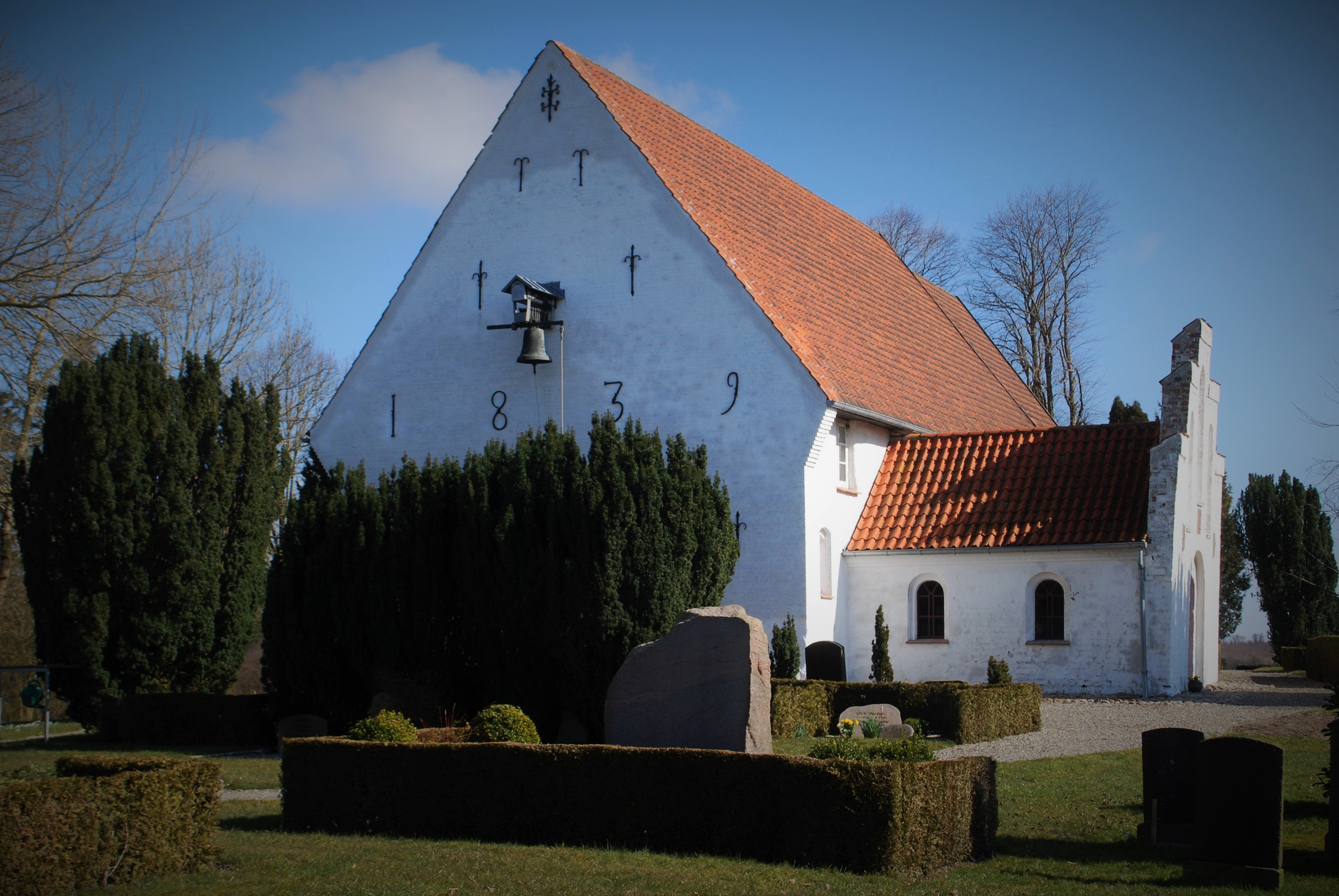 Old church of Rinkenæs, Sønderborg Kommune, Denmark